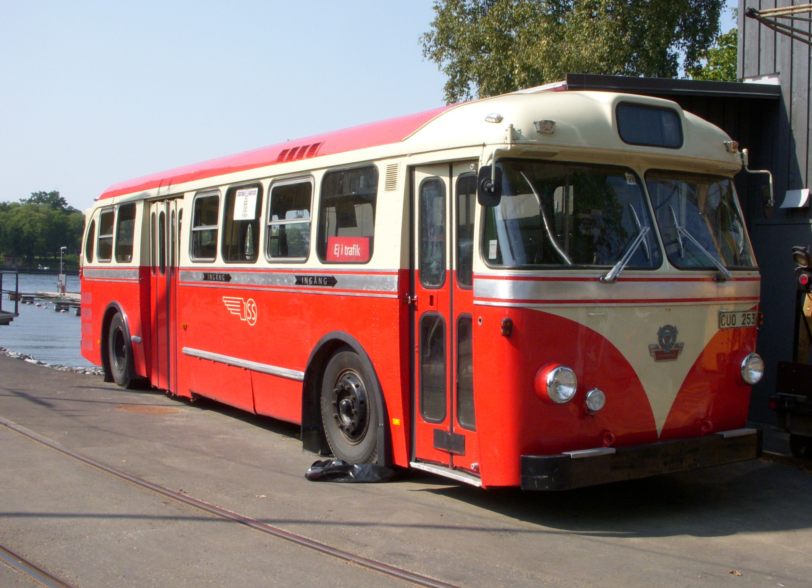 Buss "Scania Vabis Capitol"